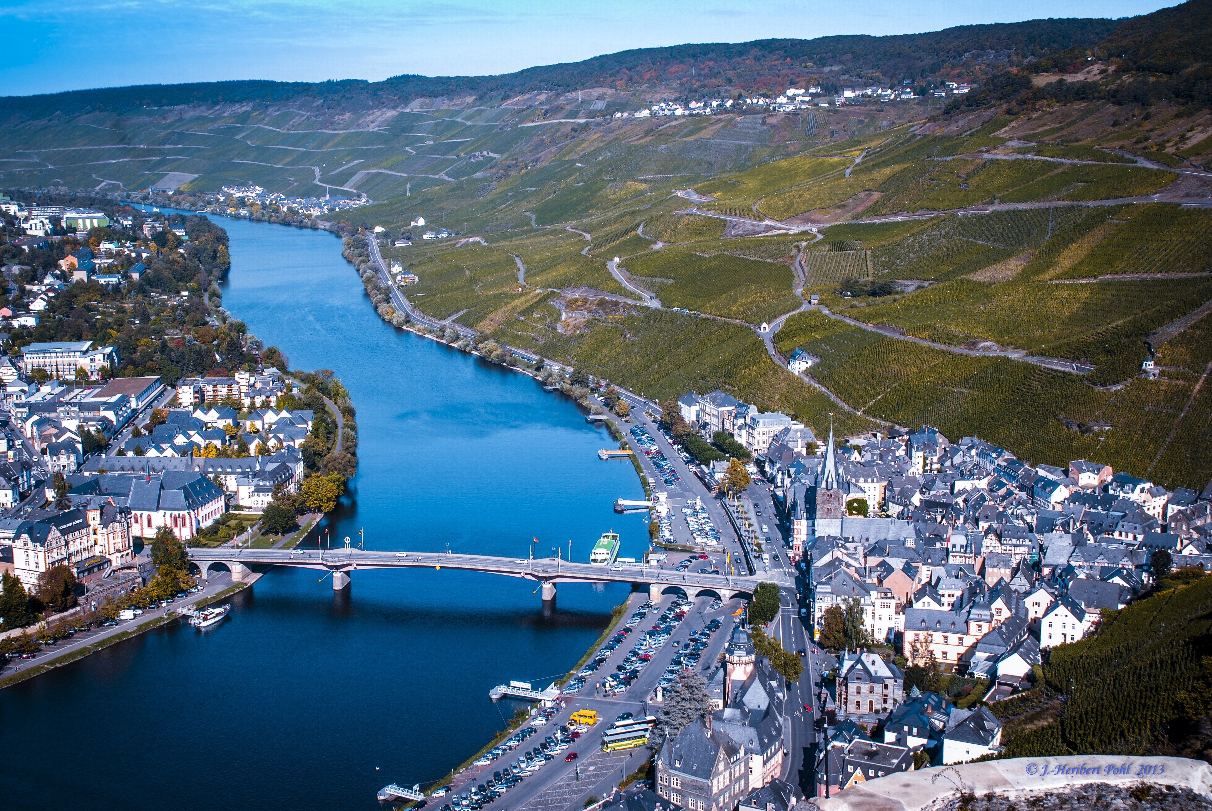 Rheinland-Pfalz, Germany Bernkastel-Kues und das mittlere Moseltal, Blick von der Ruine Landshut